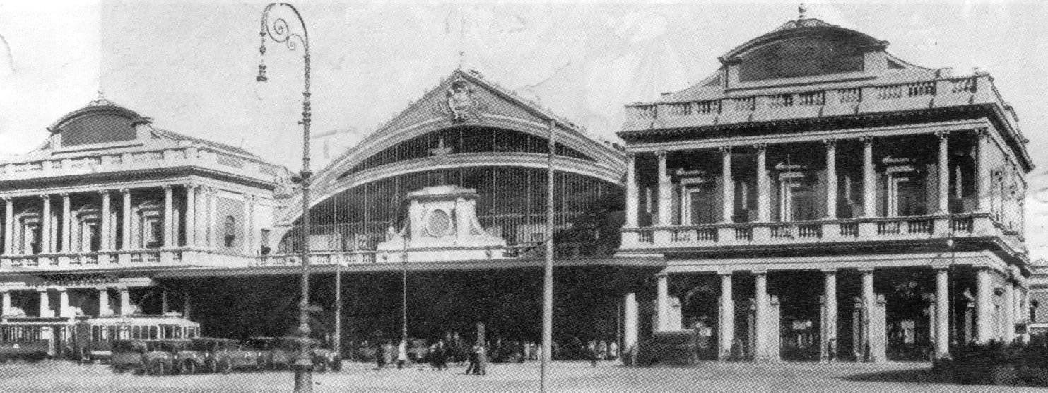 Foto della Stazione Termini a Roma. Immagine pubblicata più di venti anni fa.